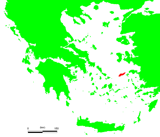 GR Ikaria.PNG (Greek island)